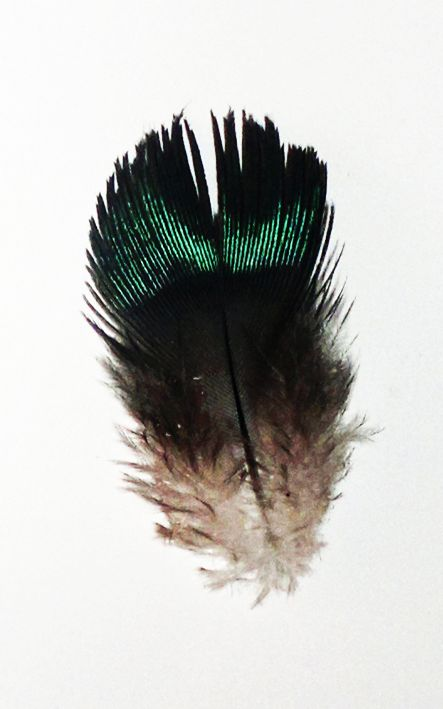 Ploma cobertora terciaria d'un colom.